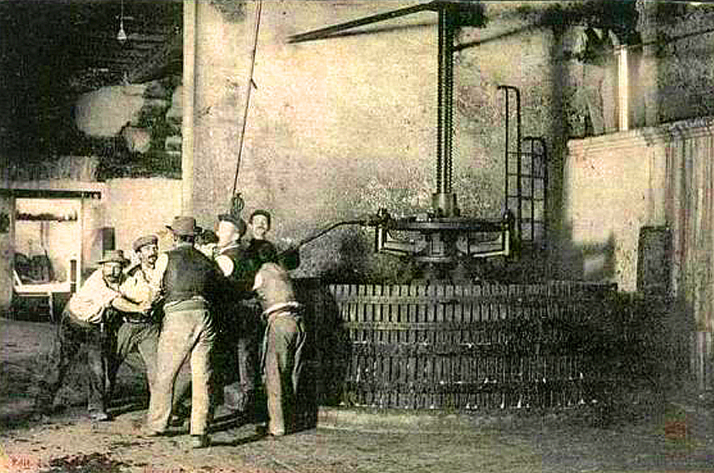 Pressoir à Beziers dans les années 1900